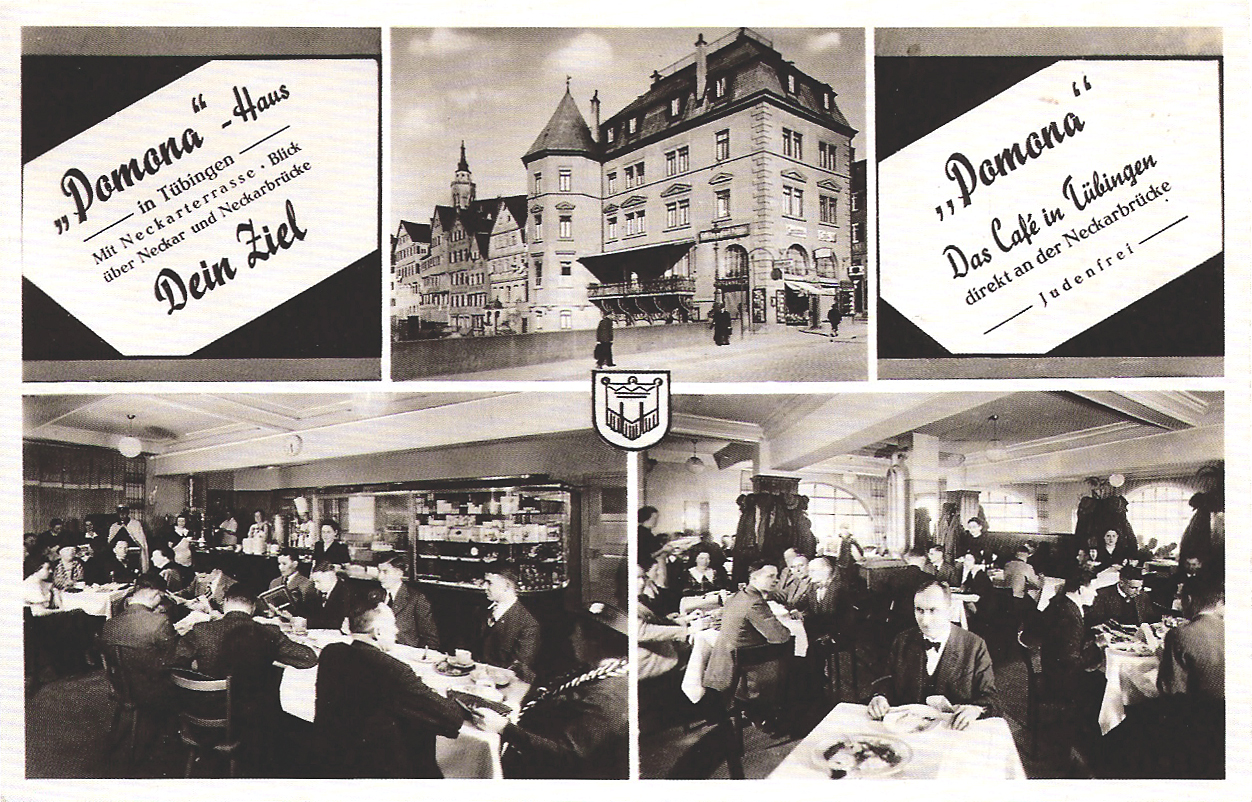 Café Pomona am Neckartor in Tübingen wurde 1928 eröffnet, nachdem das sich dort zuvor befindende Kino geschlossen und umgestaltet wurde. Unter dem späteren Pächter warb es stark als erstes Lokal in Tübingen, dass es „judenfrei“ sei. Der Betrieb wurde im März 1944 eingestellt, als auf das gegenüberligende Uhlandhaus eine Bombe fiel und auch dieses Haus verwüstete. (Mehrbild-Fotoansichtskarte der Gebrüder Metz)